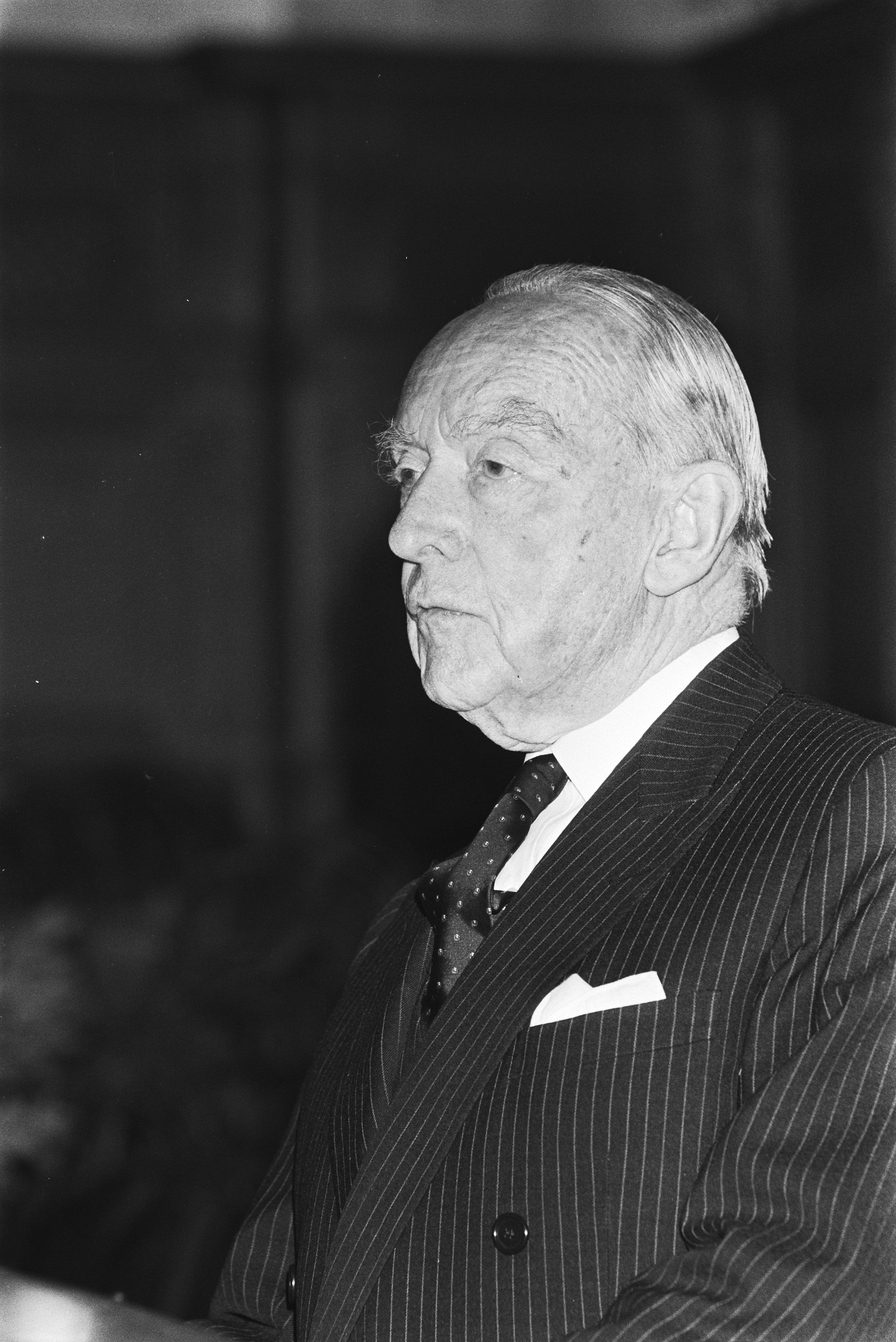 Collectie / Archief : Fotocollectie Anefo Reportage / Serie : [ onbekend ] Beschrijving : Uitreiking Wateler Vredesprijs aan dr. Van Roijen in Vredespaleis v.m. ambassadeur en v.m. minister van BuiZa Datum : 24 januari 1984 Locatie : Den Haag, Zuid-Holland Trefwoorden : Uitreikingen, prijzen Persoonsnaam : Dr. van Roijen Instellingsnaam : Vredespaleis Fotograaf : Croes, Rob C. / Anefo Auteursrechthebbende : Nationaal Archief Materiaalsoort : Negatief (zwart/wit) Nummer archiefinventaris : bekijk toegang 2.24.01.05 Bestanddeelnummer : 932-8430